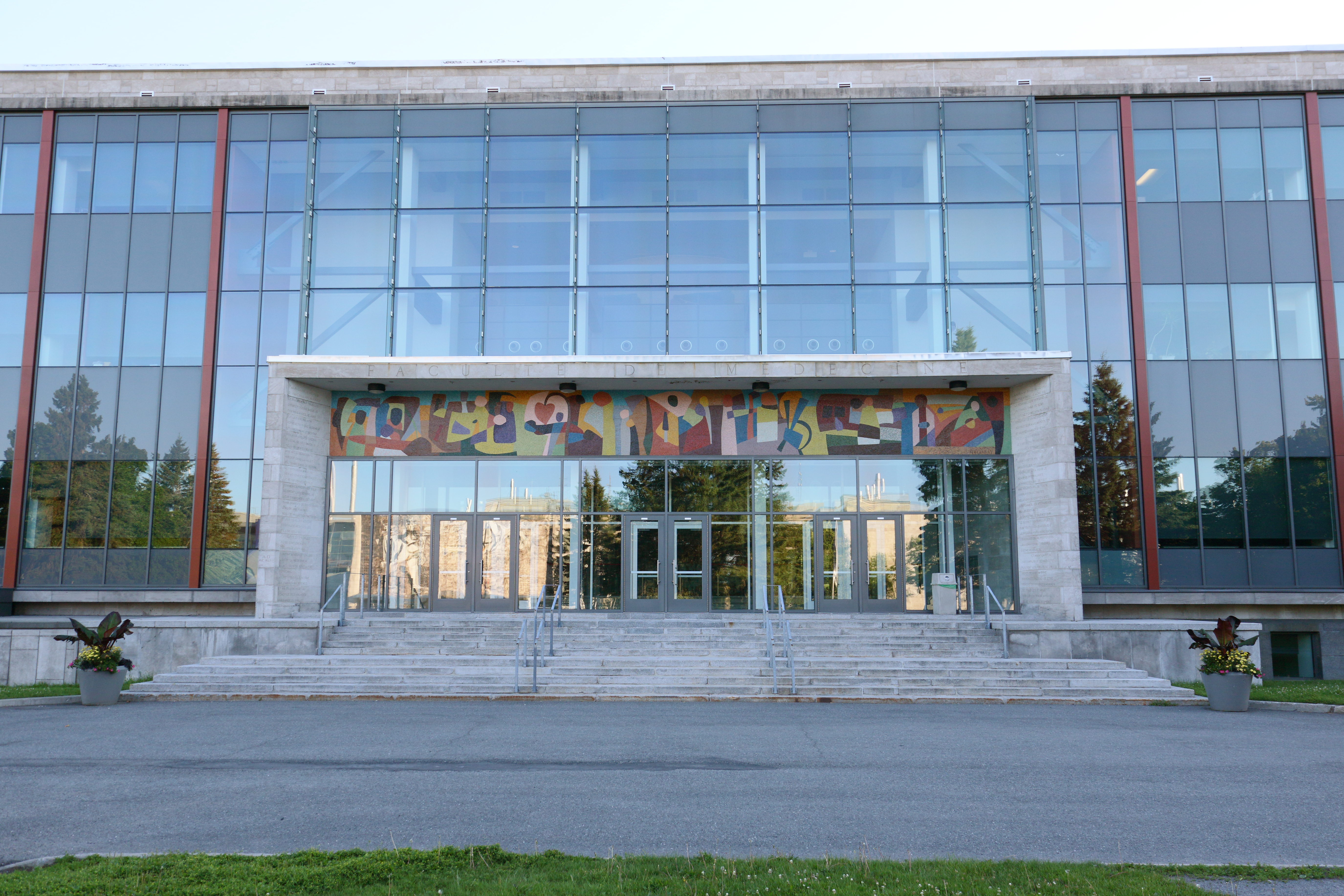 La mosaïque représente l'évolution de la médecine depuis ses origines jusqu'à son stade moderne et technique, tant dans le prolongement de sa recherche que dans son application en milieu hospitalier, en référence aux activités théoriques et pratiques prévues dans le complexe médical de l'Université Laval.